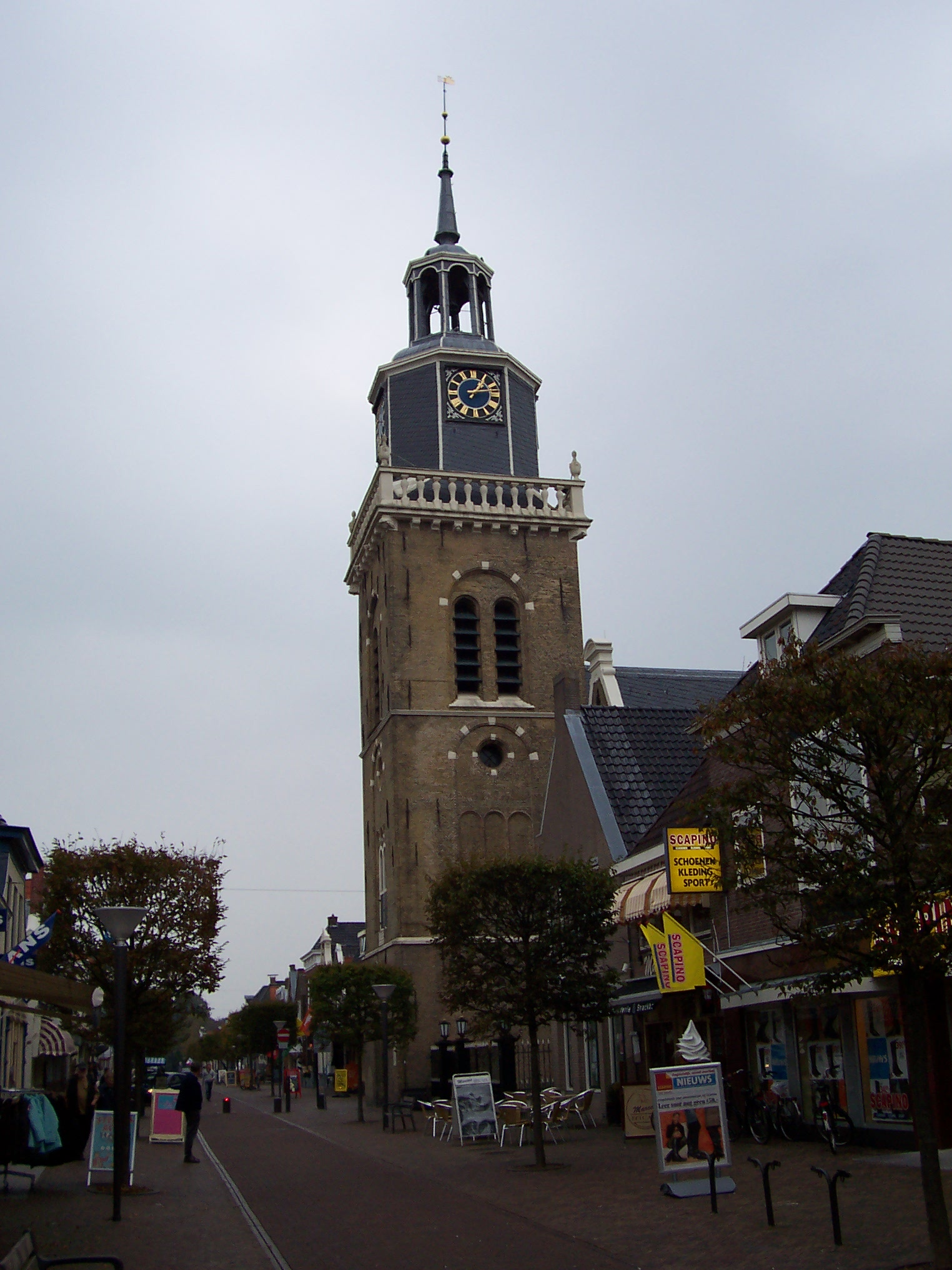 Joure, Jouster toer